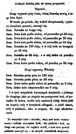 opis ćwiczeń wyprawy po husrasku i wyprawy po wlosku przytoczone w traktacie Gospodarstwo Jezdeckie Strzelcze y Mysliwcze, z Doswiadczenia NN. Szlachcica Polskiego napisane Roku Pańskiego 1600. A teraz swiezo z dozwoleniem starszych Do Druku podane.